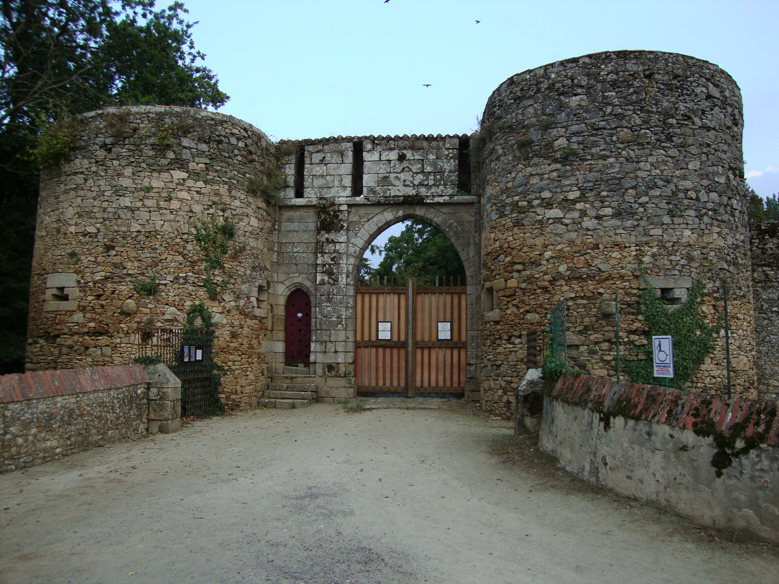 Château des Essarts, Le Vieux-Château (Inscrit, 1962) .